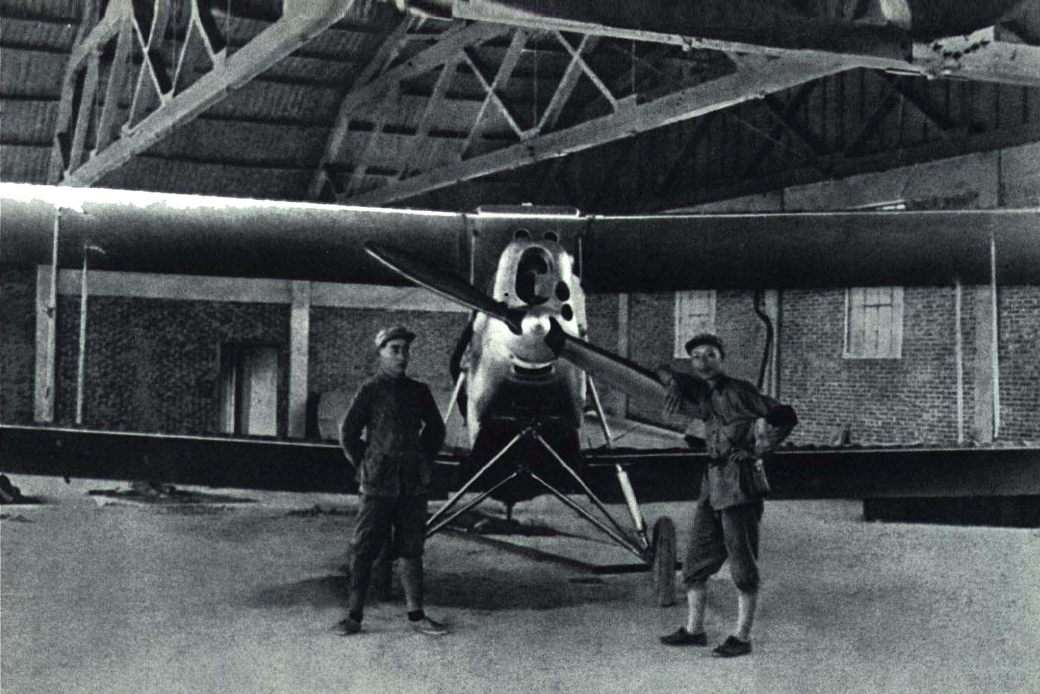 1967-10 漳州战役后林彪与聂荣臻